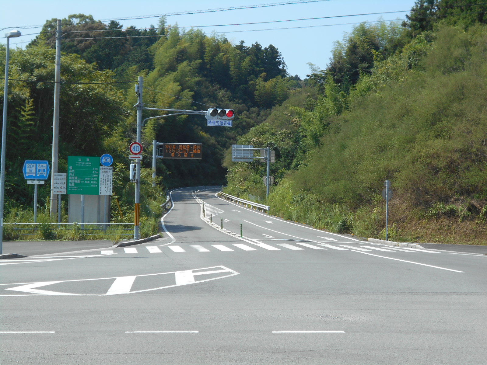 三間インターチェンジ